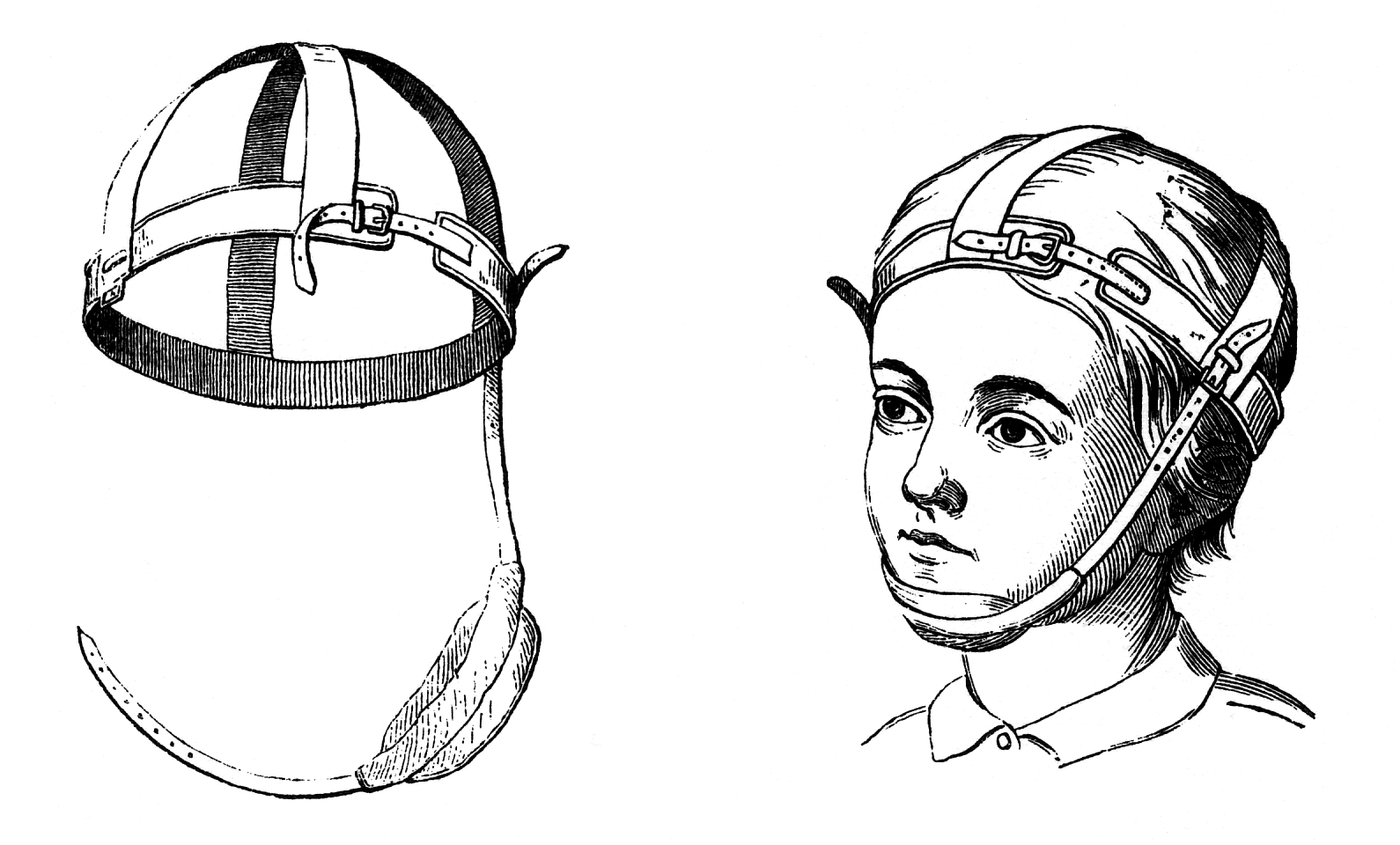 Ein Kinnband zur Vermeidung eines Fehlbisses, entworfen von Moritz Schreber. Illustration aus: D.G.M. Schreber: Kallipädie. Leipzig 1858